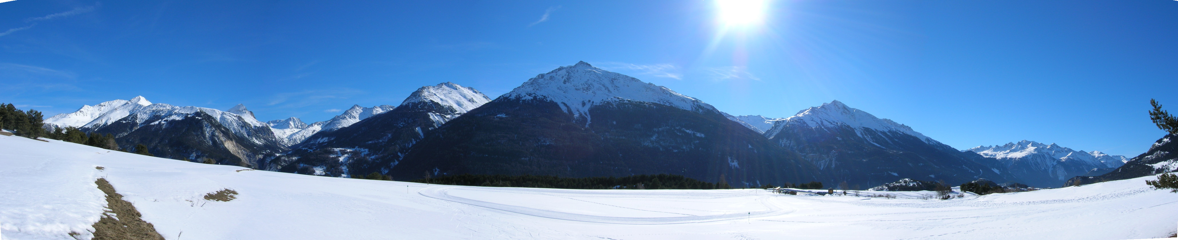 Versant nord du massif du Mont-Cenis depuis Aussois